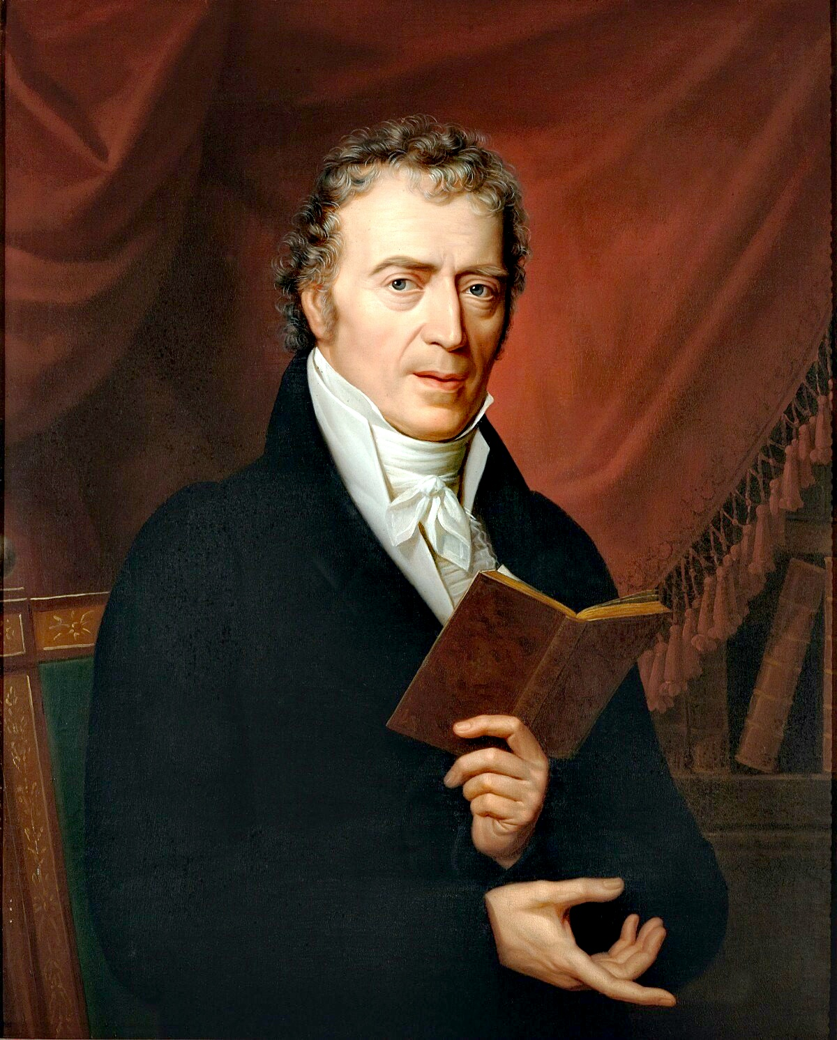 Porträt Christian Adolph Overbeck, 1818; Öl/Lw. 84 x 67,5 cm Bezeichnet u. r. R. Suhrlandt. pinx.1818; Inv. Nr. G 386 MKK Lübeck